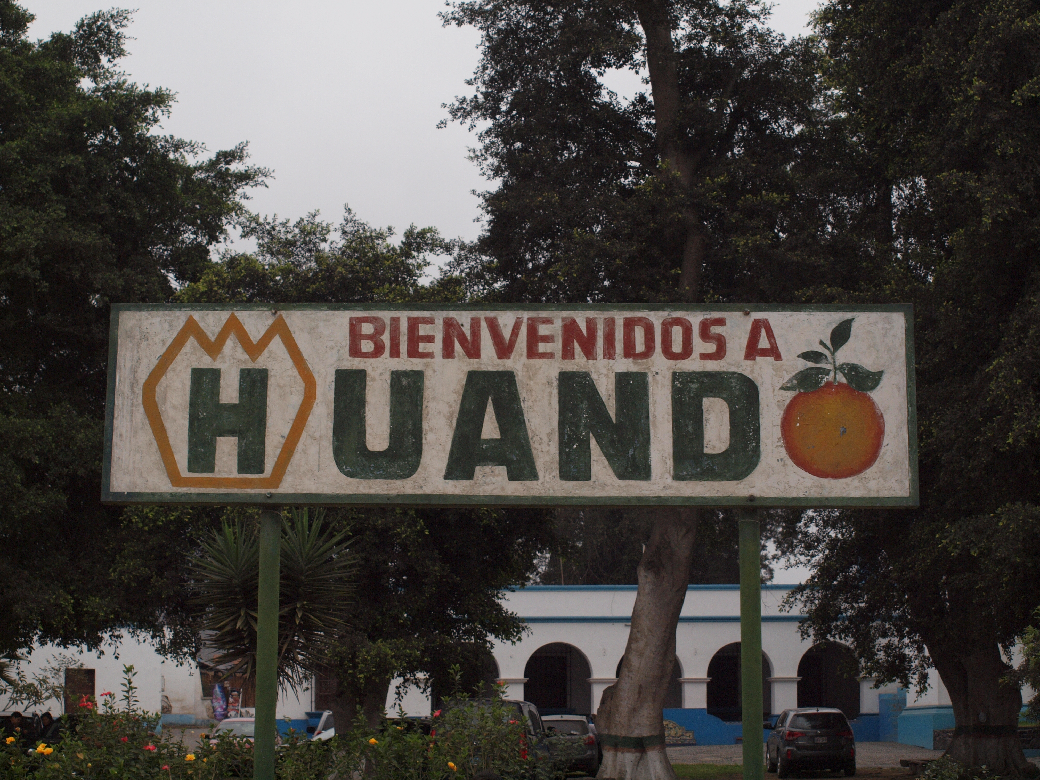 Cartel de entrada a la casa hacienda